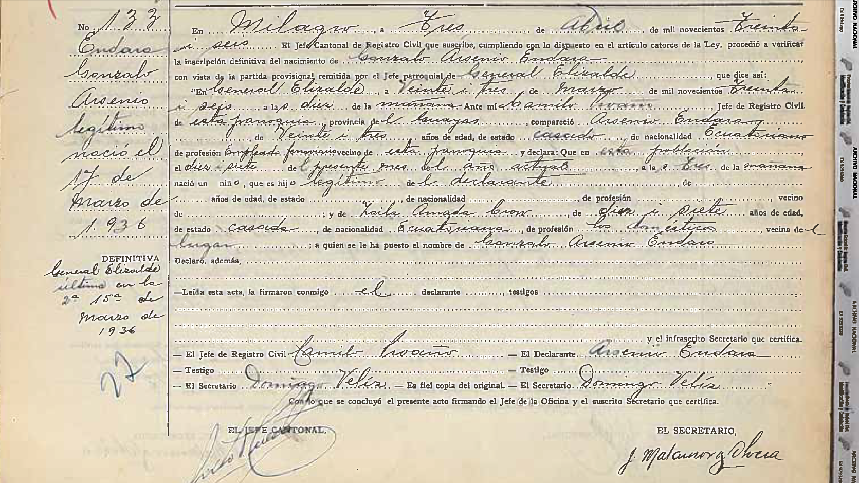 Registro de nacimiento Gonzalo Endara. Partida de nacimiento Gonzalo Endara.